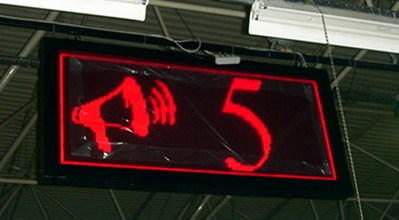 Andon Otomasyonu kullana bir otomotiv yan sanayiinde, 5 nolu kullanicinin butona basmasini müteakip panoda oluşan görüntü.